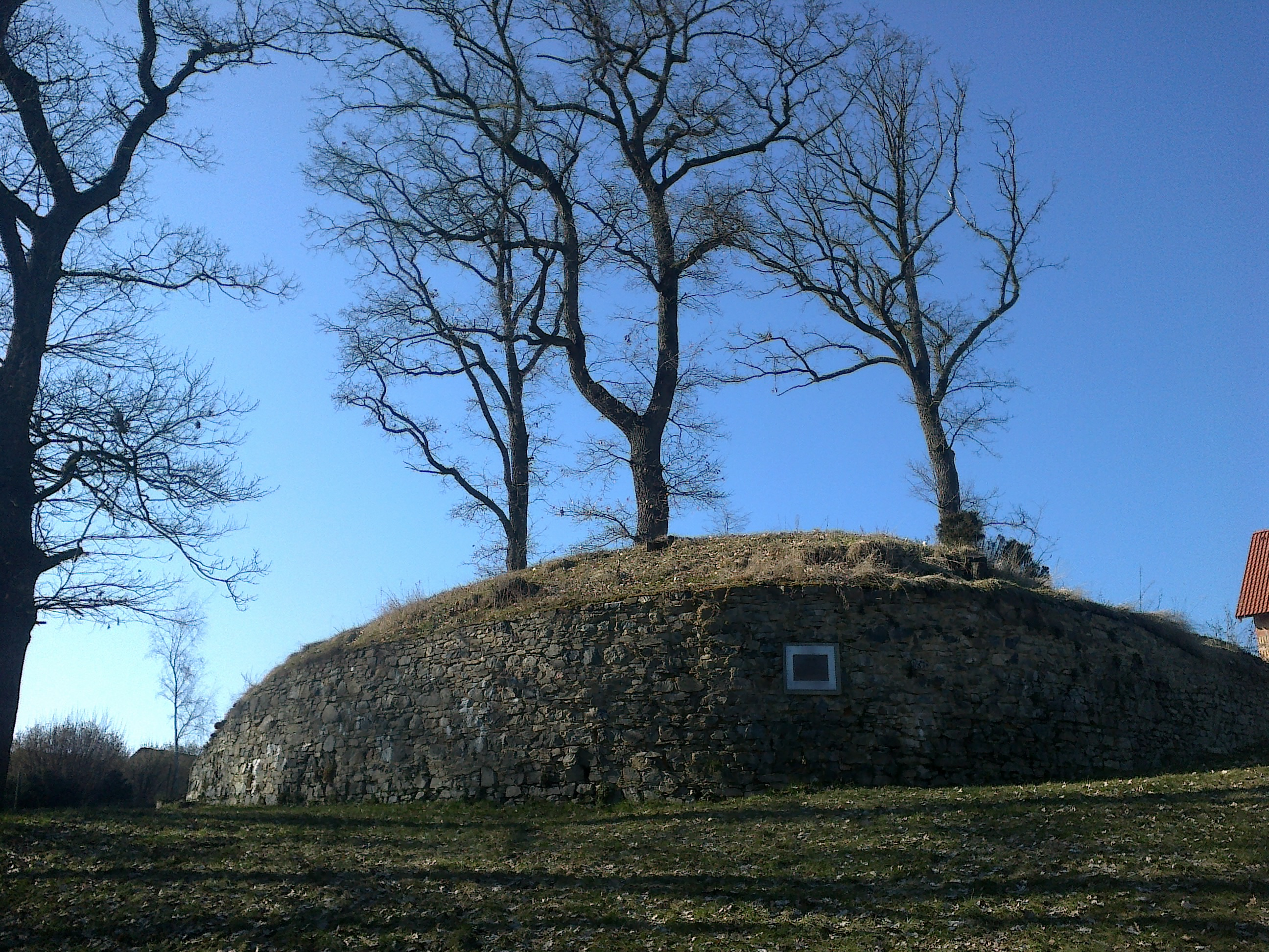 Tvrz - tvrziště, archeologické stopy (Nezvěstice), V okraj obce, Nezvěstice